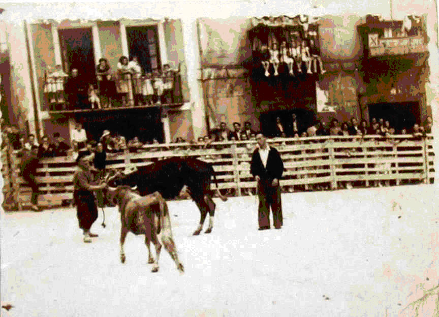 Betizu-jokoa. Zezenketa Mutriku herrian. Argazki zaharra.